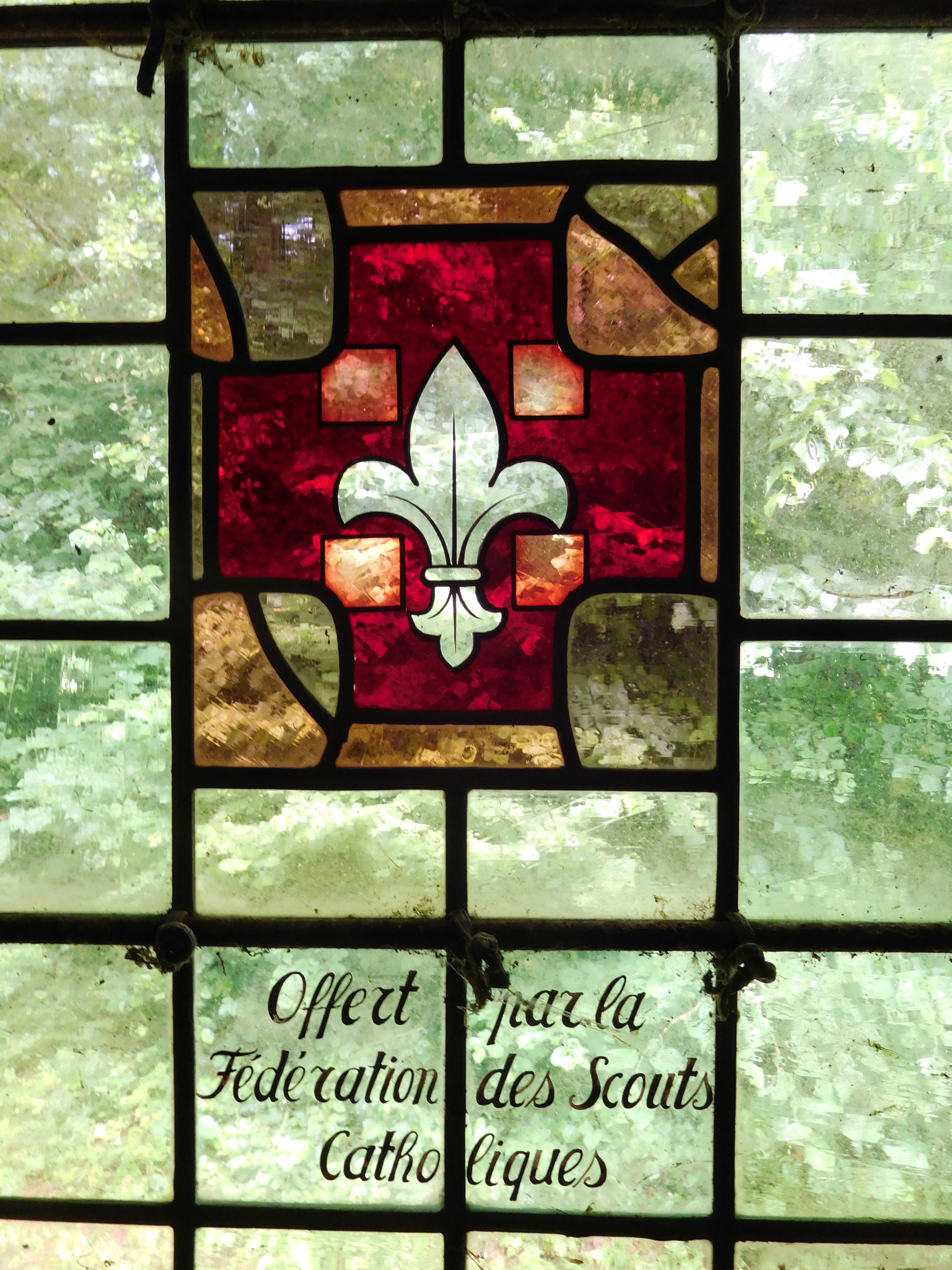 Dans la chapelle Notre-Dame des Scouts, se trouve le vitrail offert par la fédération des scouts catholiques de Belgique. La chapelle fut construite par les scouts eux-mêmes.